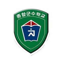 육군종합군수학교 부대 마크